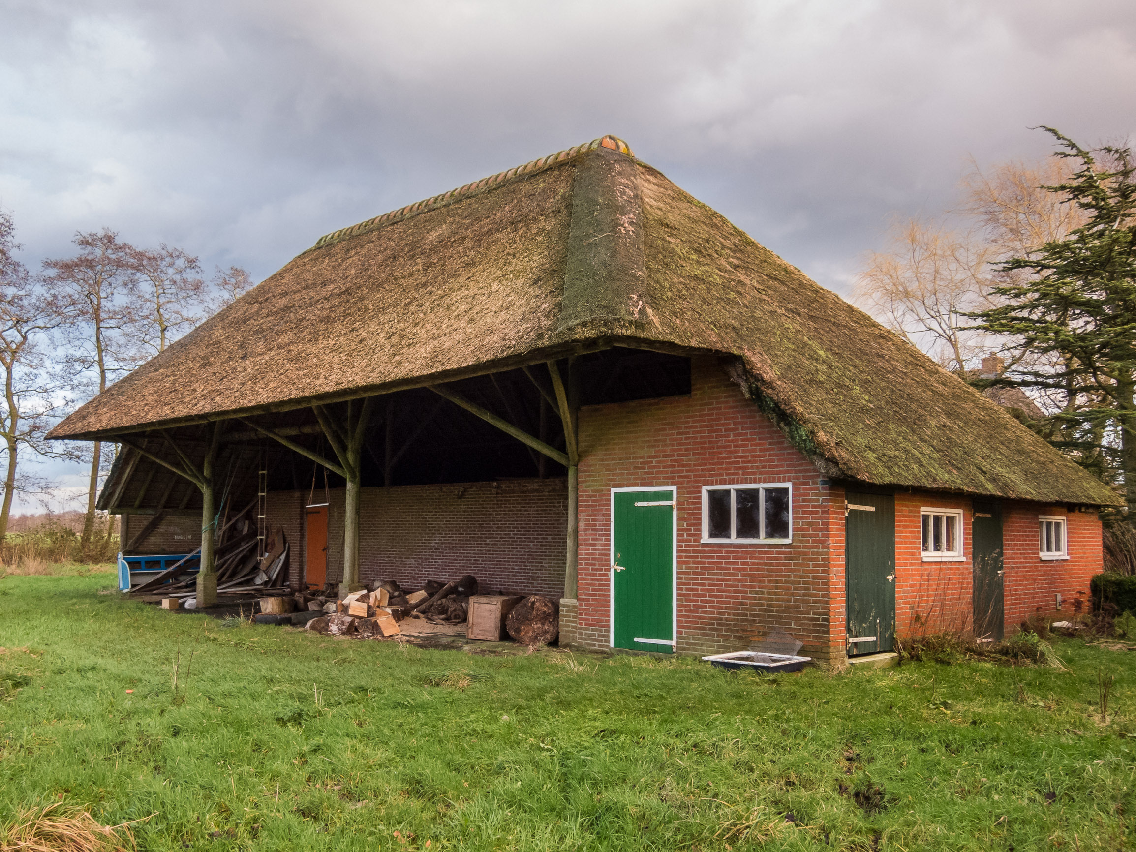 De loop stal van de boerderij aan de Bildwei 66 in Rottevalle was een van de nieuwigheden toen Rottevalle in de jaren 50 voorbeeld dorp voor de rest van Nederland was.